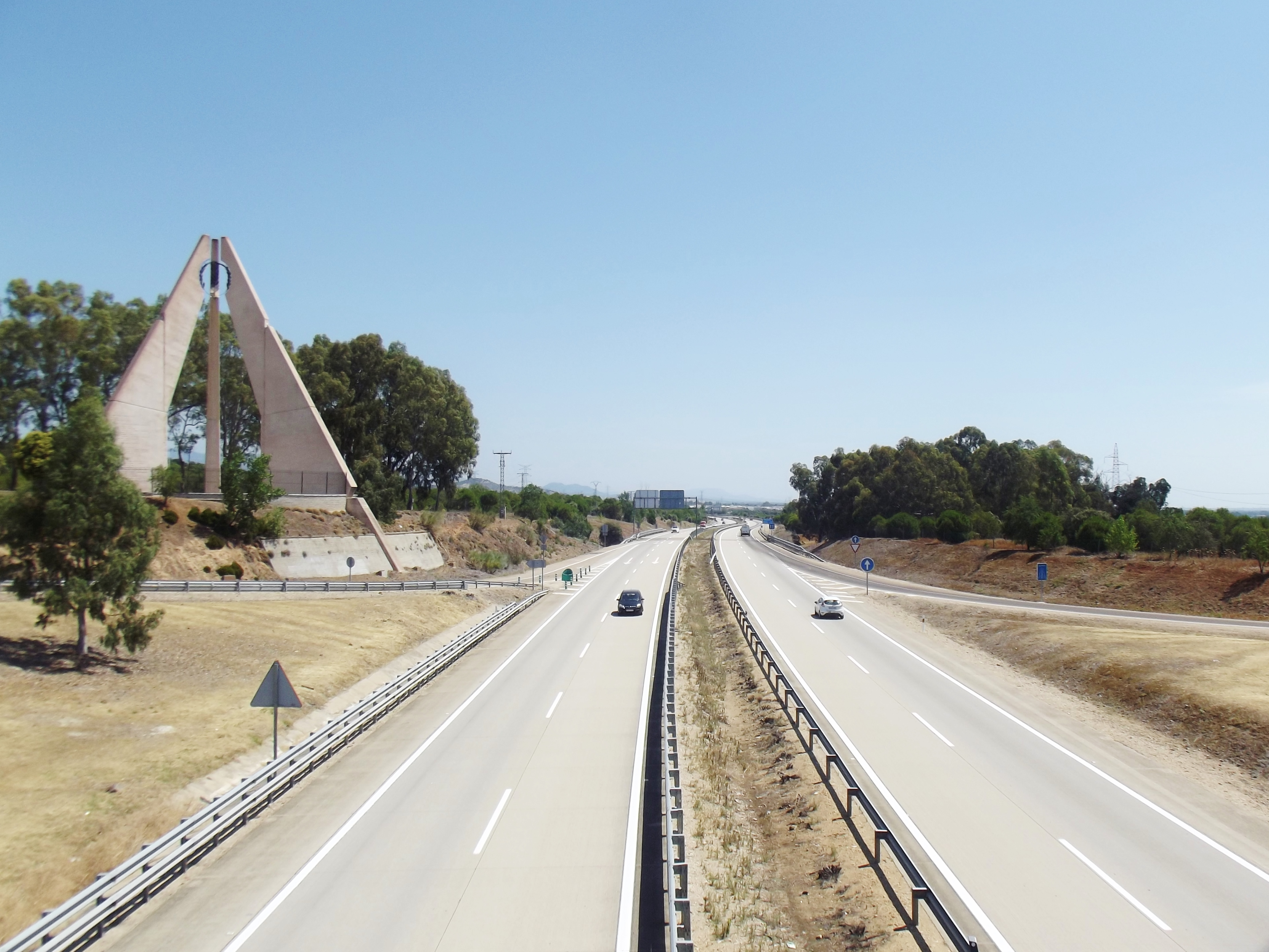 Carretera A-5 a la altura de Talavera de la Reina (provincia de Toledo).